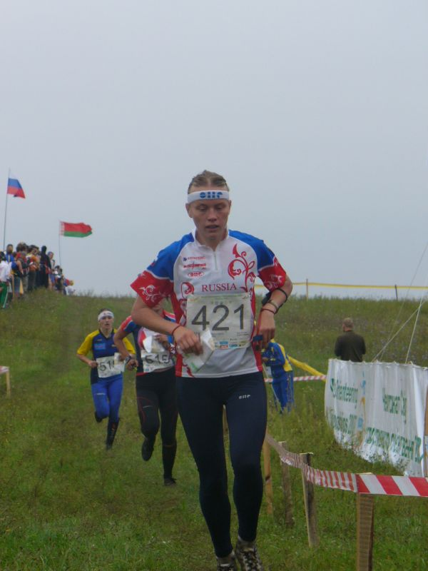 Tatiana Ryabkina, WOC2007, Kiev Ukrain